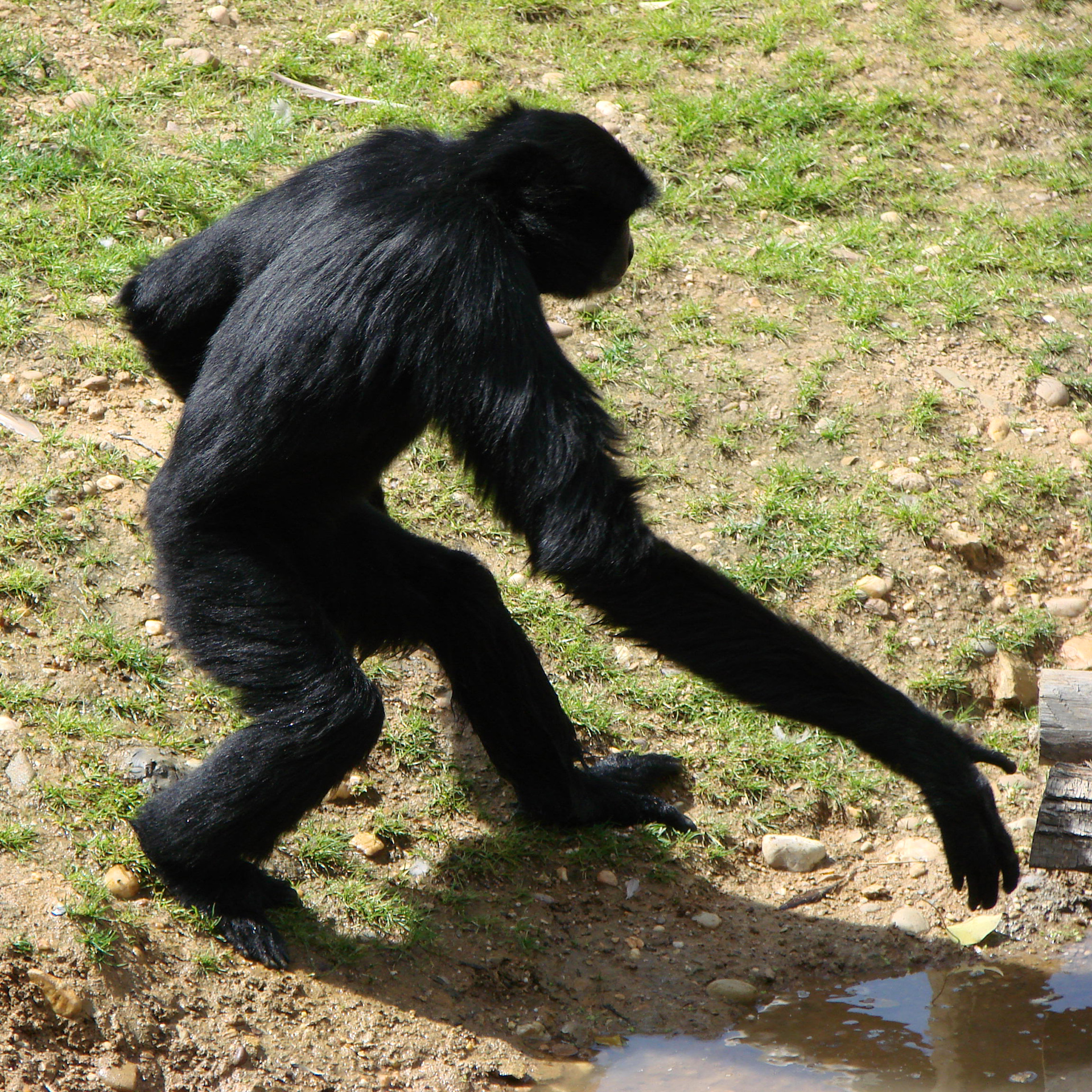 Siamang (Hylobates syndactylus /symphalangus syndactylus), zoo d'Amnéville.